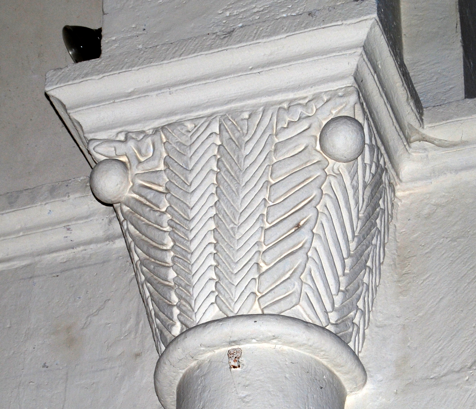 Chapiteaux de l'église Notre-Dame de Lestiac-sur-Garonne